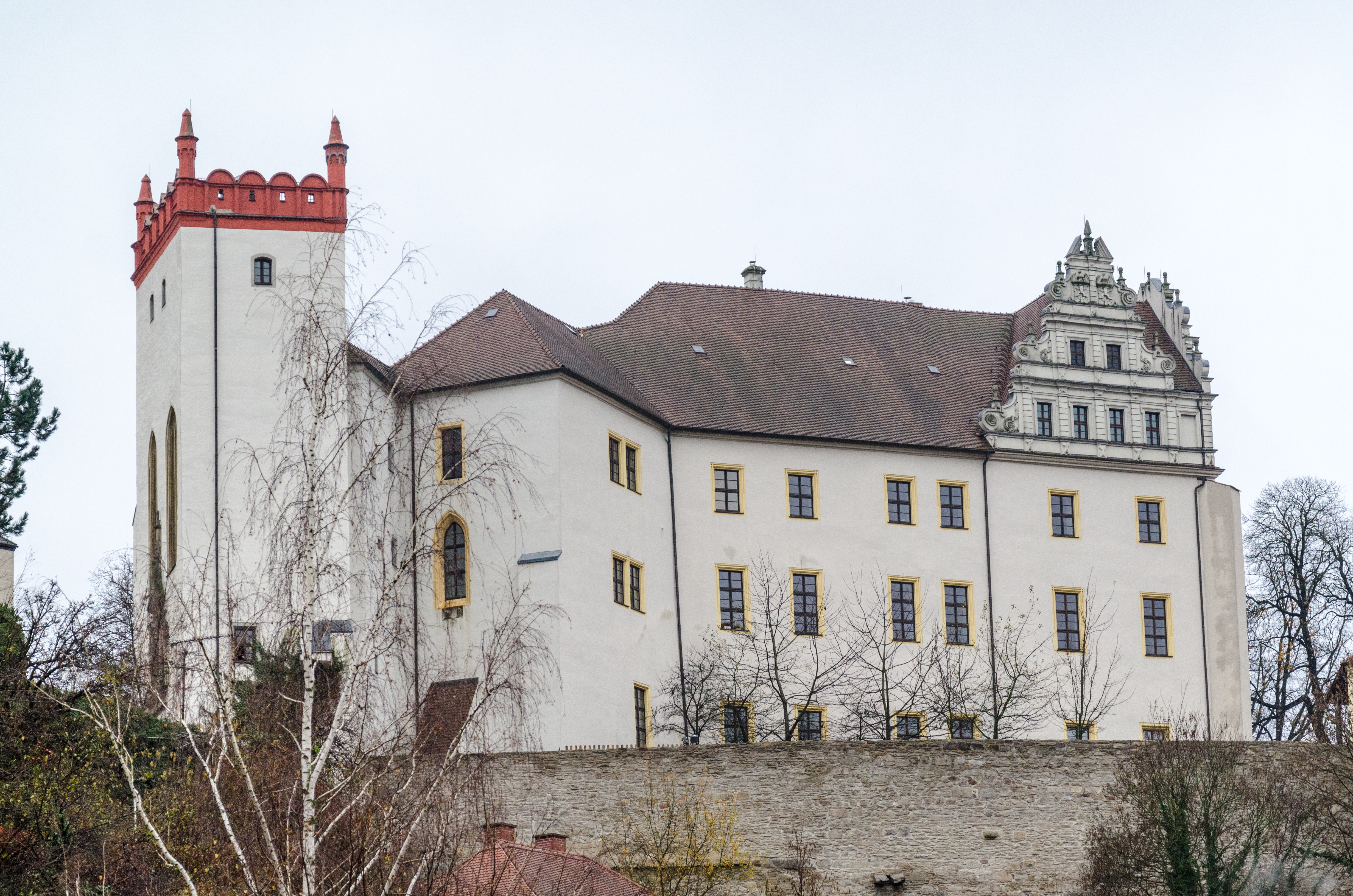 Bautzen, Ortenburg, Talseite, von Norden